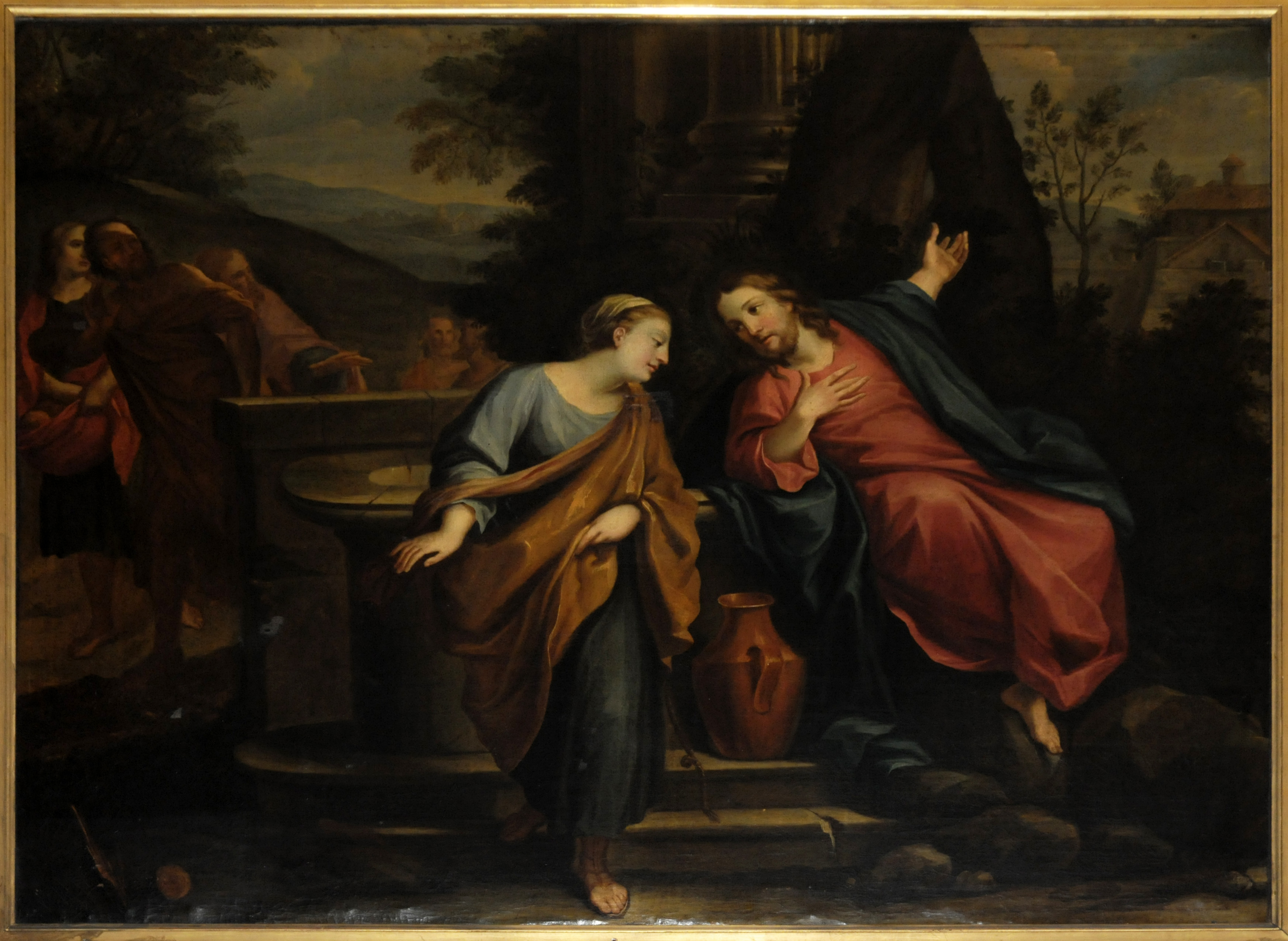 Le Christ et la Samaritaine, Unknown (French art) du XVIIe